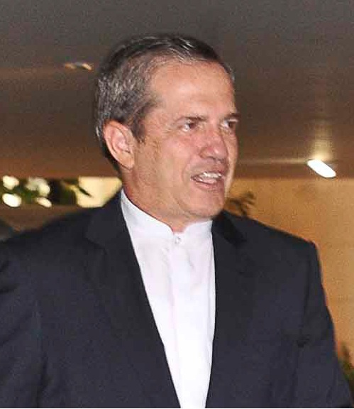 Brasília - Os ministros das Relações Exteriores do Equador, Ricardo Patiño, e do Brasil, Antonio Patriota, durante encontro no Palácio Itamaraty